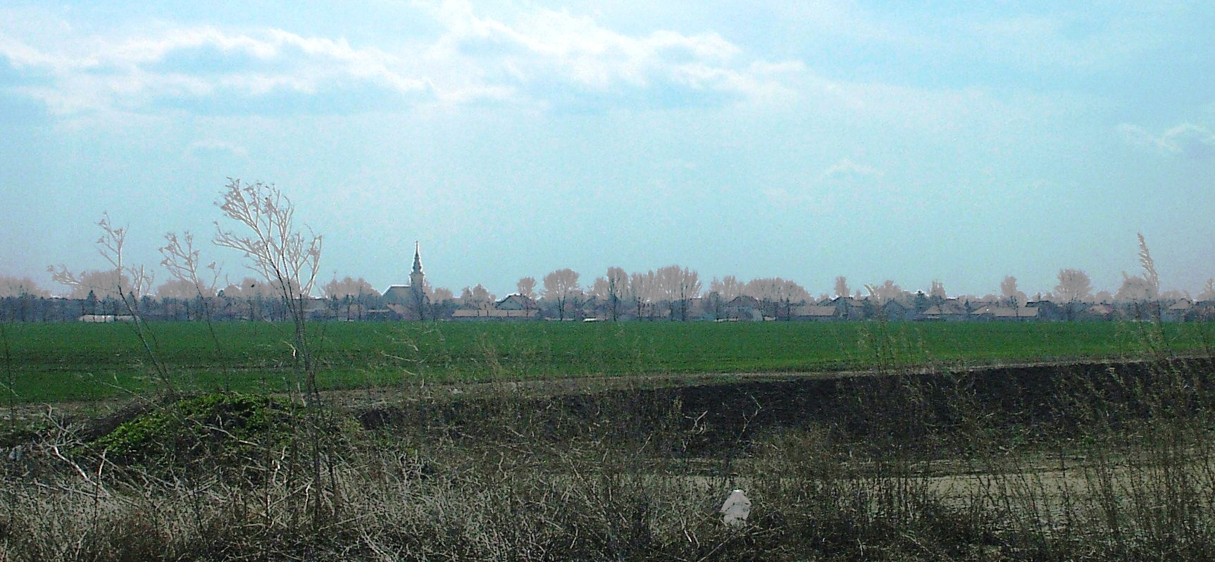 Бачки Маглић